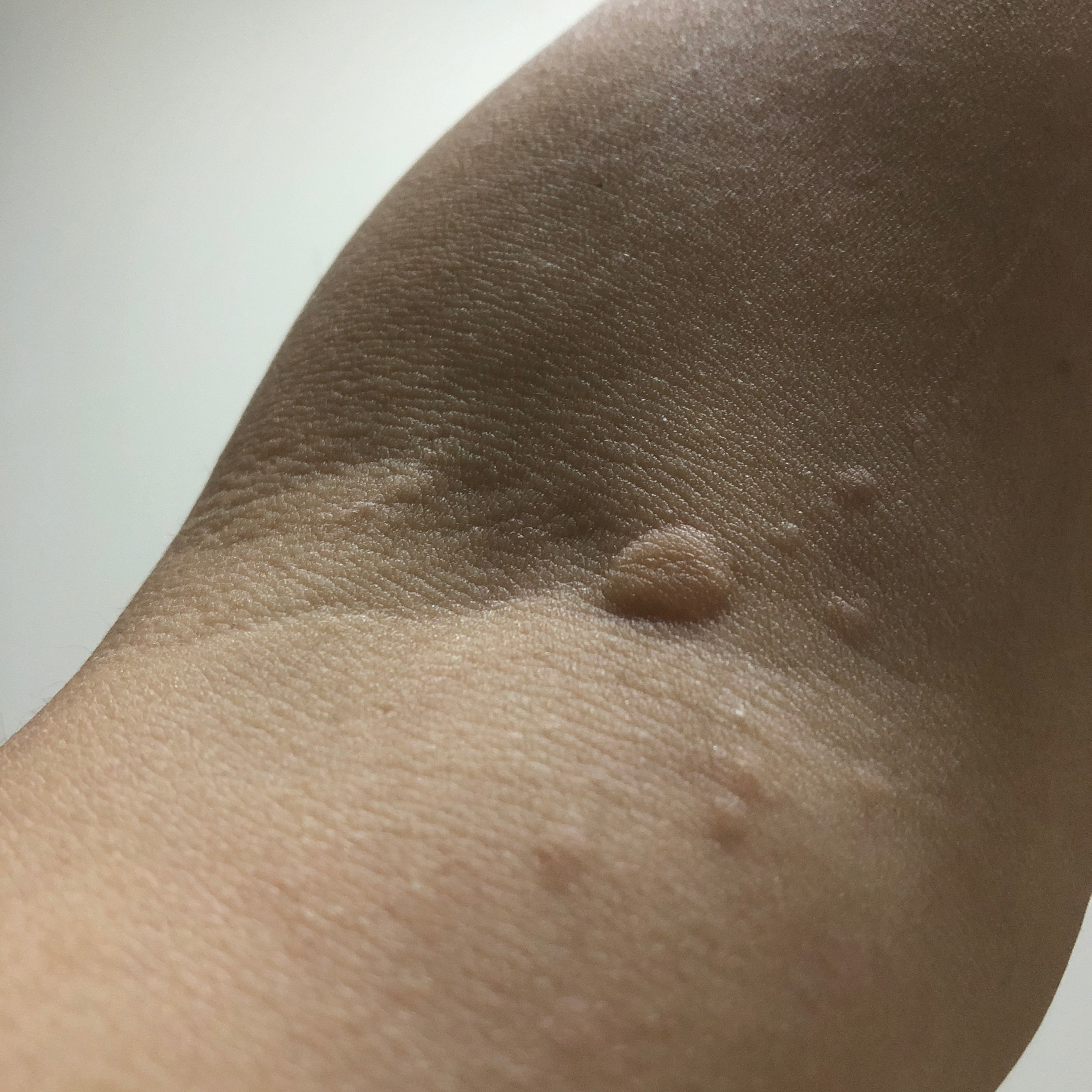 ゼラチンパウダーを使用して腕に発現した蕁麻疹